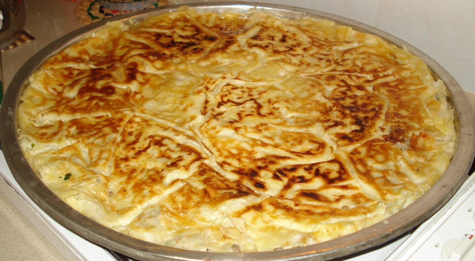 Su Böreği, a kind of burek from Turkish cuisine